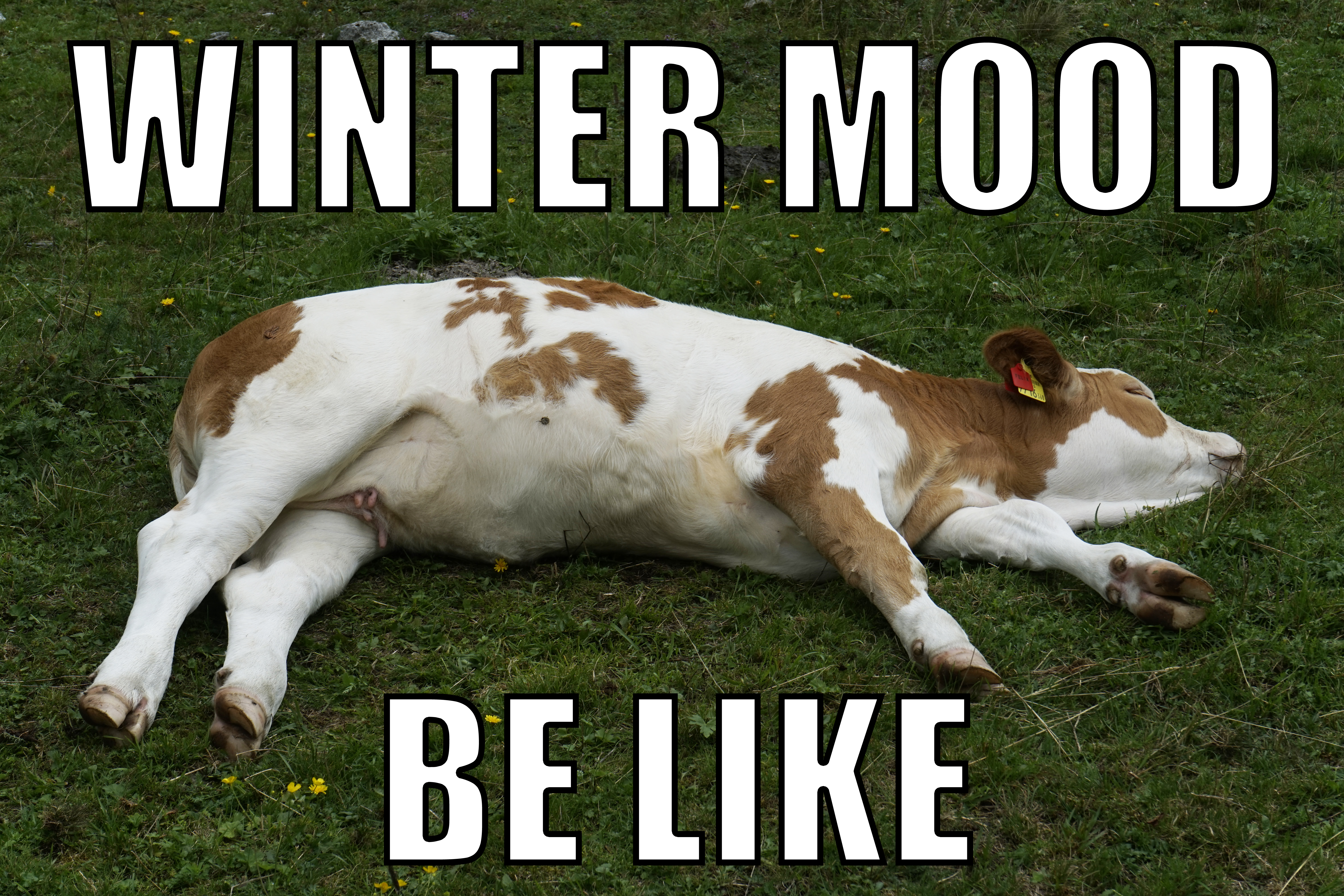 Meme mit einer liegenden Kuh. Die liegende Kuh soll die erschwerte Müdigkeit ausdrücken. Im Winter ist man dank der niedrigeren Sonnenstundenzahl müder. Die Schriftart ist Impact. Alternativer Titelname: Relaxende_Kühe_am_Wegesrand_Seebachtal_20190820_012 Meme mit Meta 002.